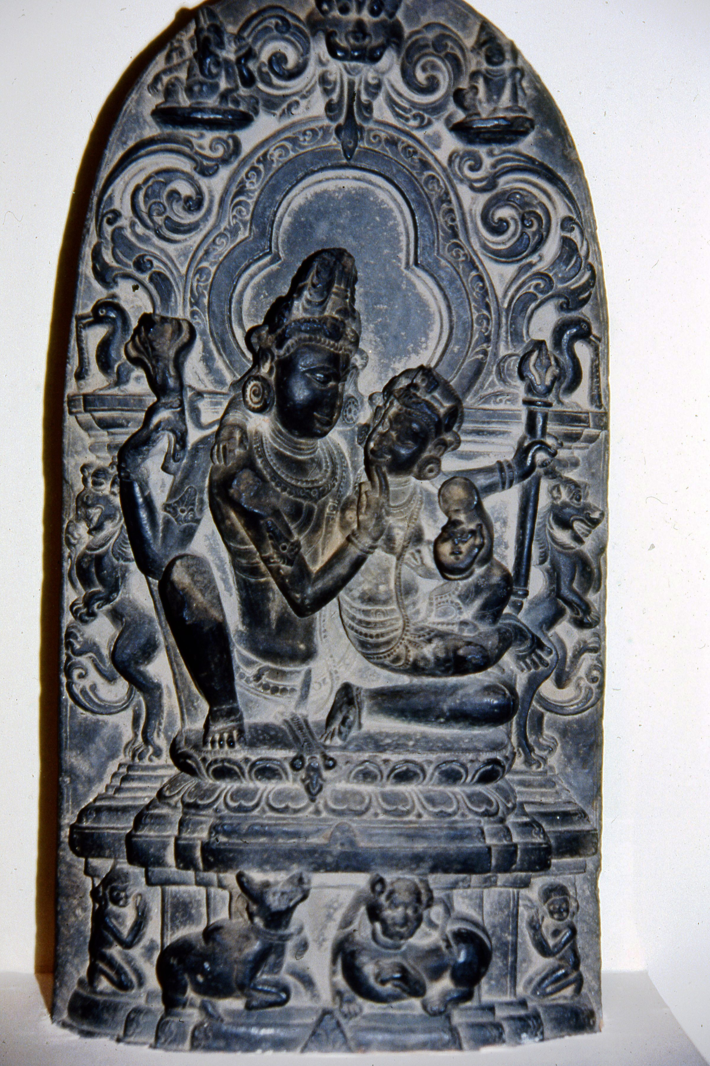 Museo estatal de Orissa, Siglo XIII, Escultura de Parvati y Siva rodeados por decoraciones de animales, probablemente provenga del templo del Sol Konarak. Bhuvanesvar, Orissa, India.